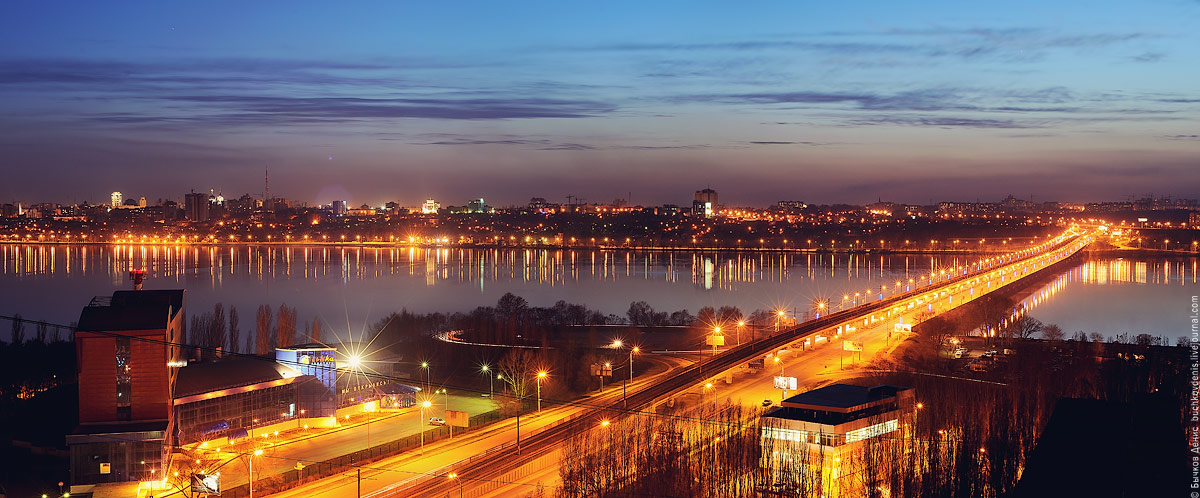 Панорама Северного моста